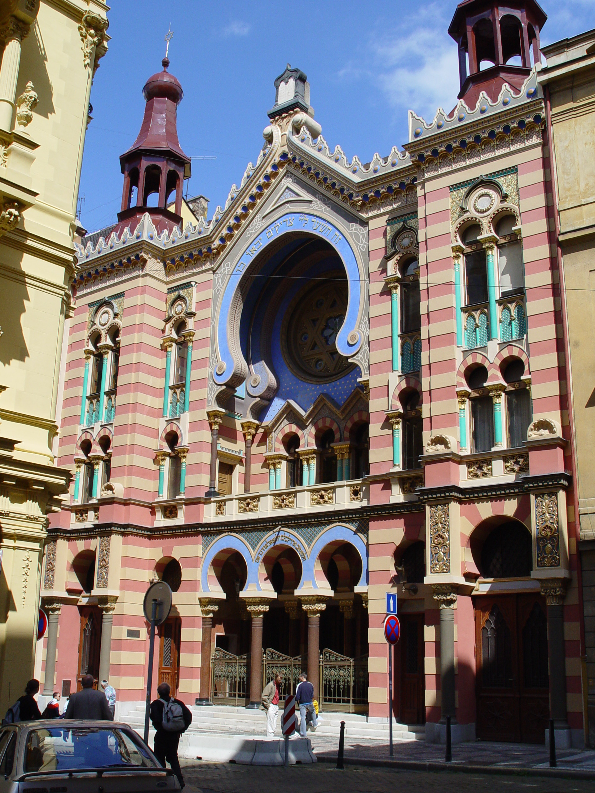 Prague - Jerusalemer Synagoge